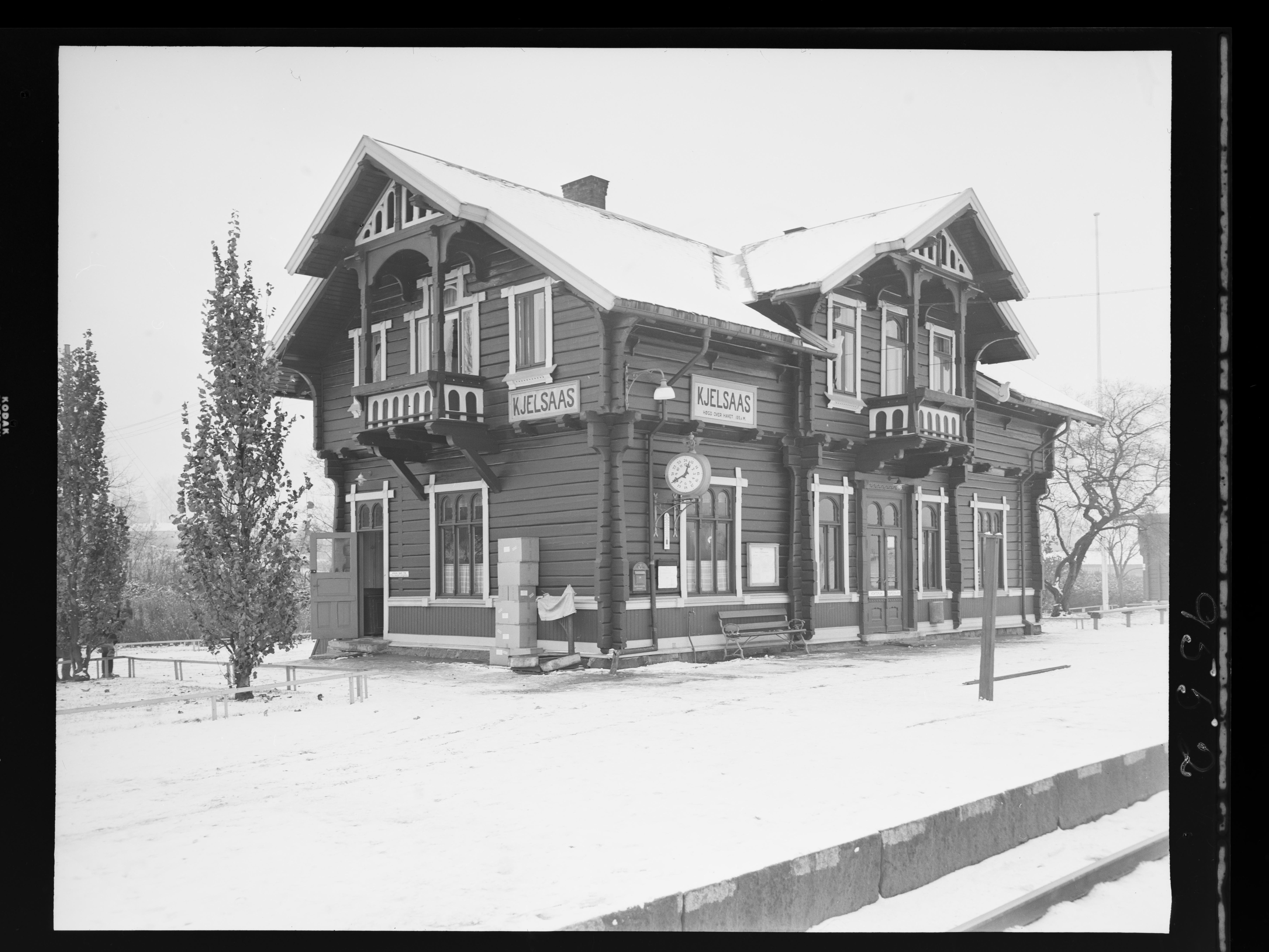 Bildet er hentet fra Nasjonalbibliotekets bildesamling. Anmerkninger til bildet var: Fotograf ukjent. Kjelsås,Oslo, Oslo, Oslo